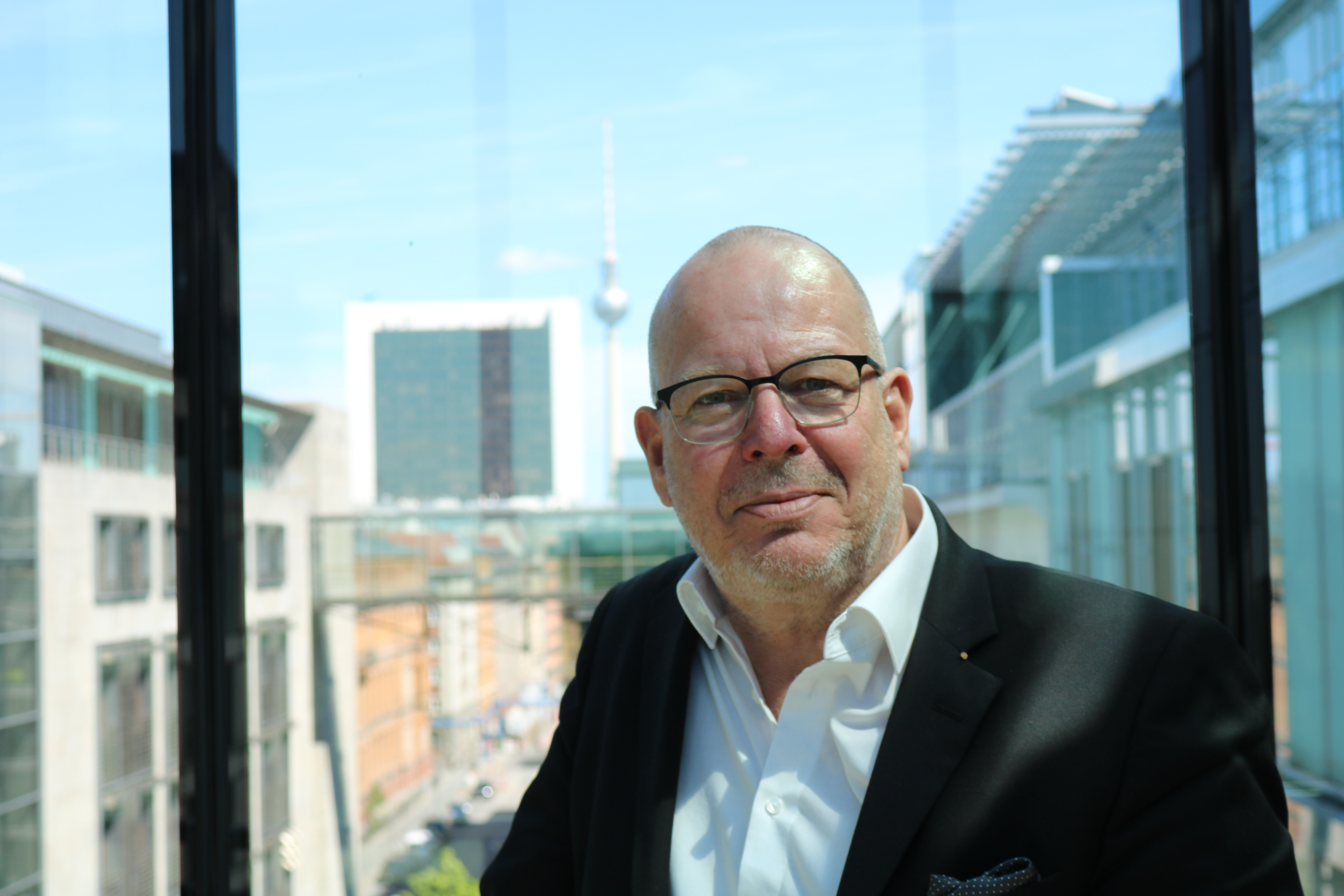 Dr. Christian Wirth, Deutscher Bundestag 2020